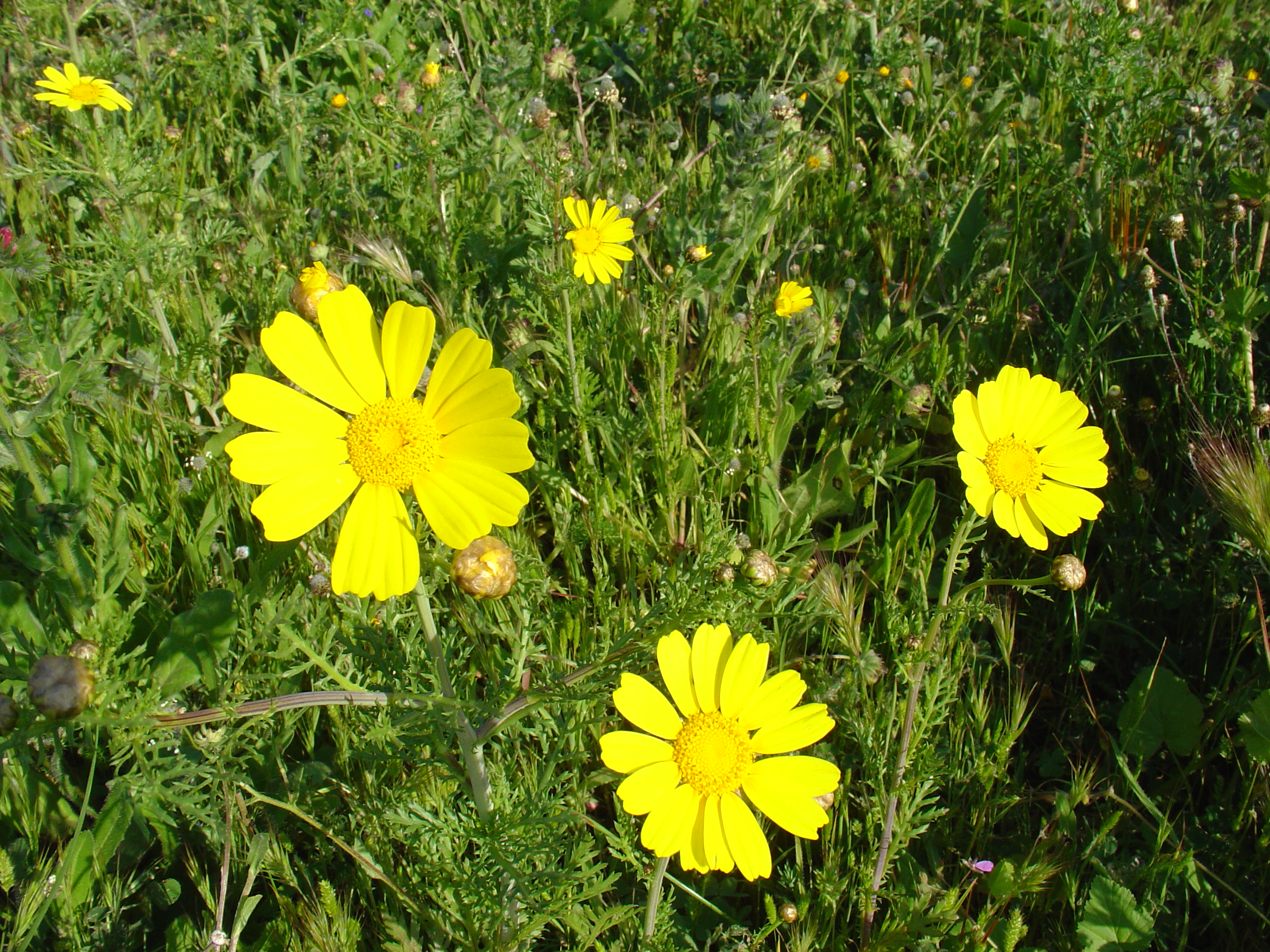 Chrysanthemum coronarium procedente de margen de camino en Sierra Minera, Murcia, Spain